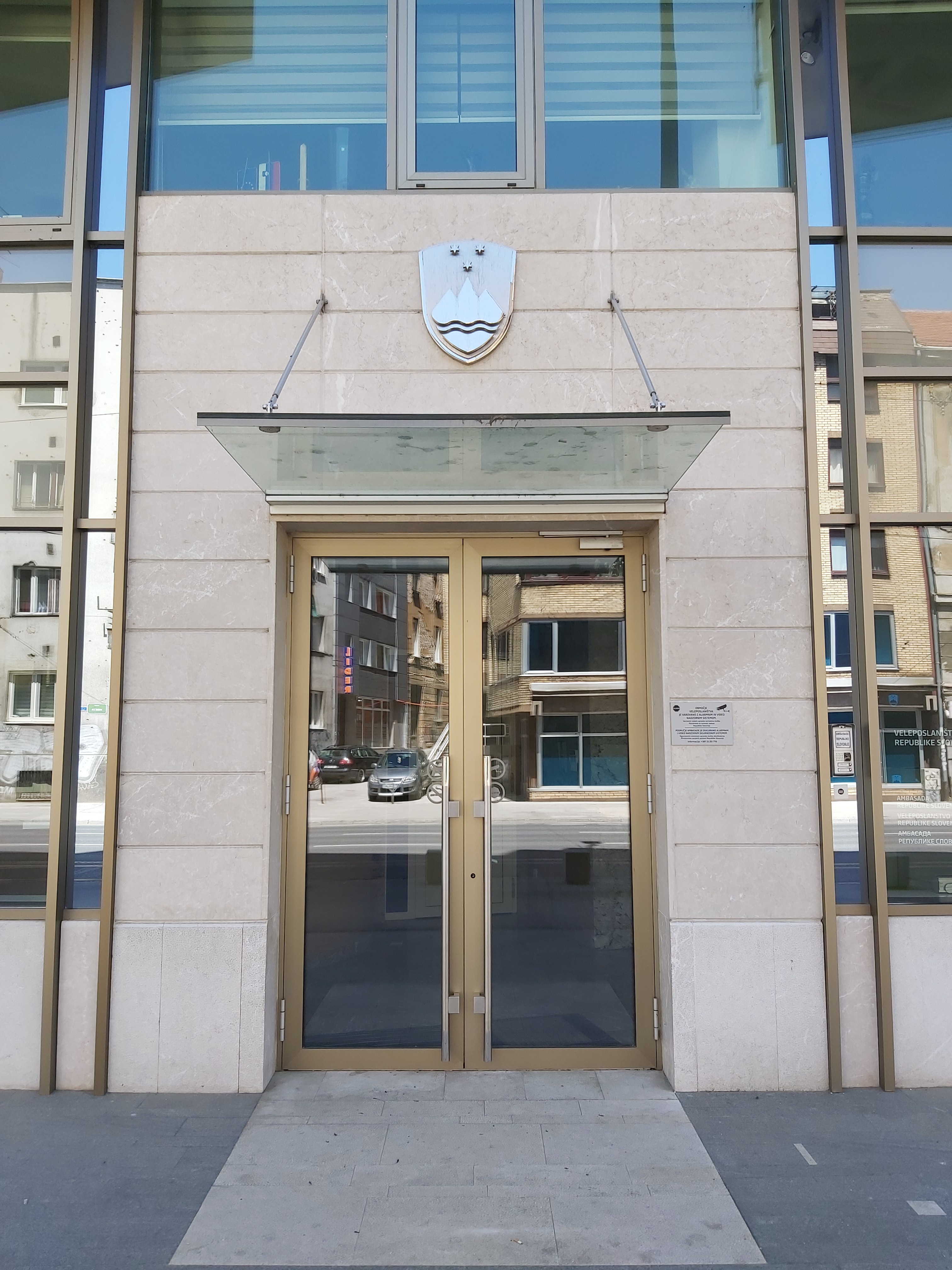 Veleposlaništvo Republike Slovenije Sarajevo